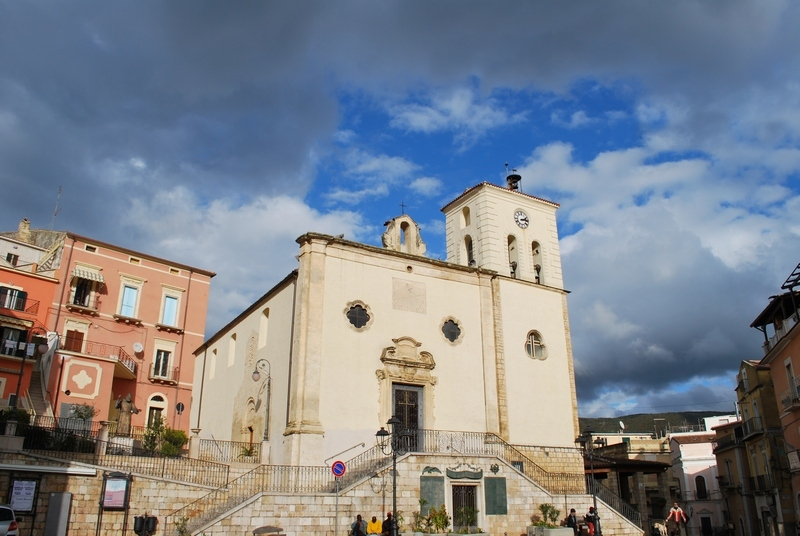 Chiesa di San Cirillo, Carpino